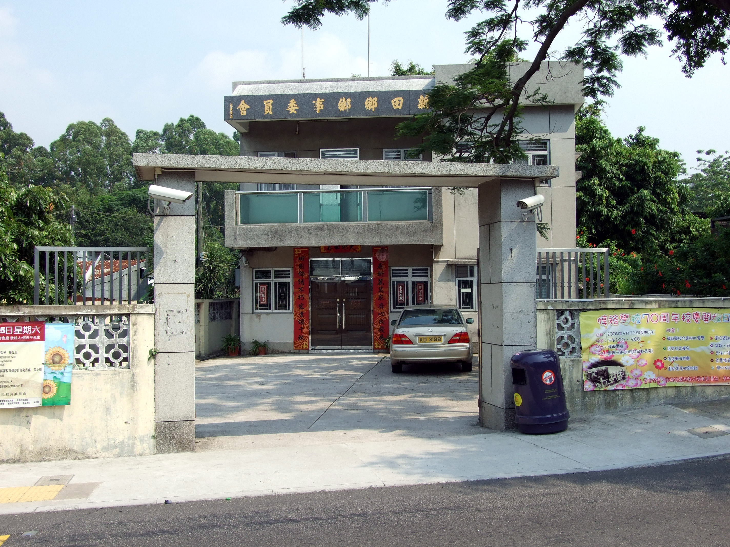 中文（香港）: 新田鄉事委員會